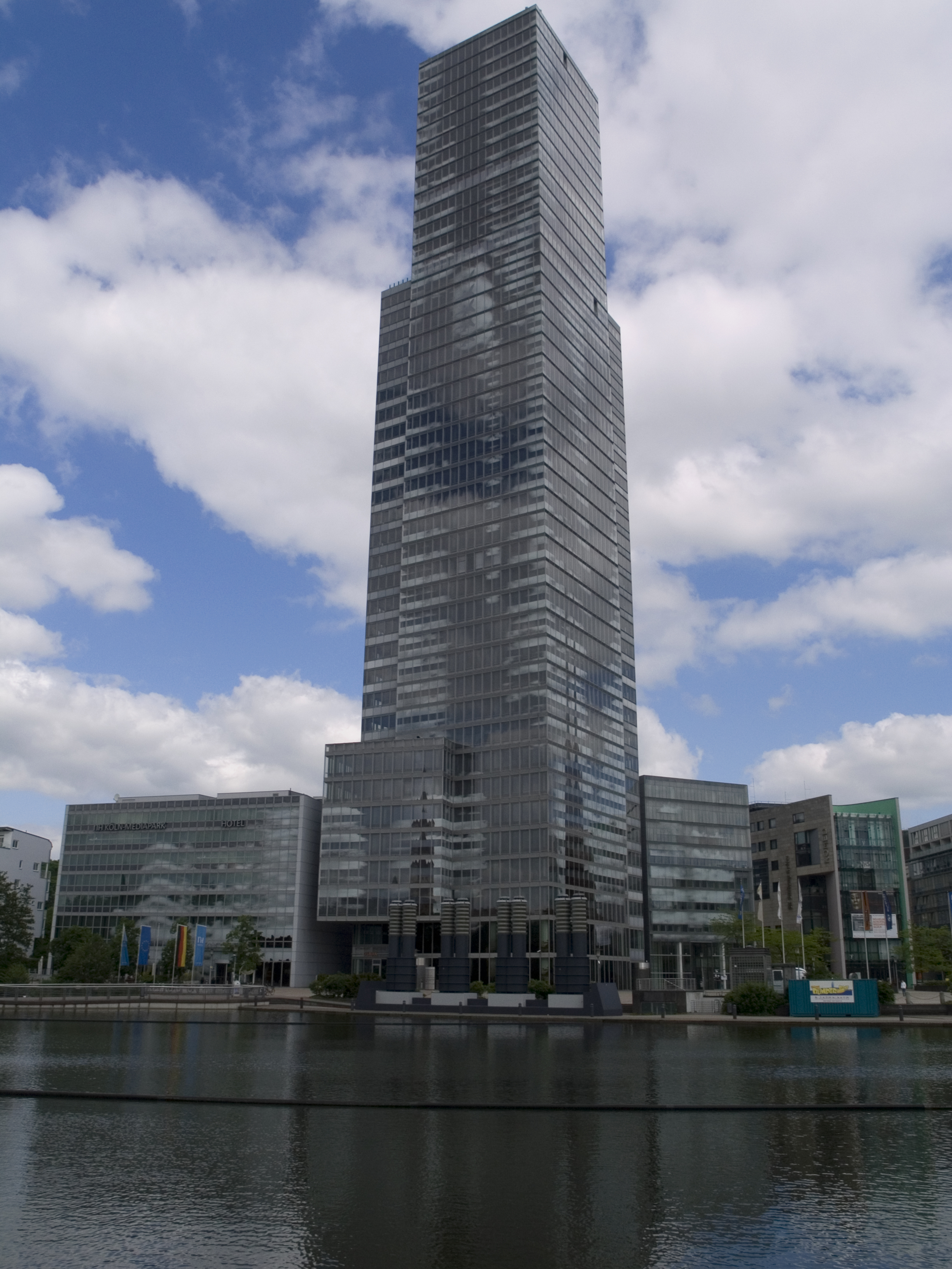 Северный Рейн - Вестфалия, Кёльн - Высотное здание Kölnturm